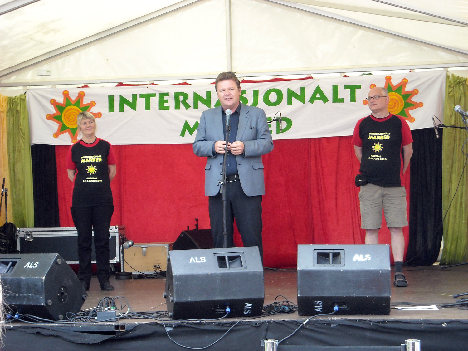 Fylkesmann i Aust-Agder, Øystein Djupedal, åpner Internasjonalt Marked i Arendal 2010